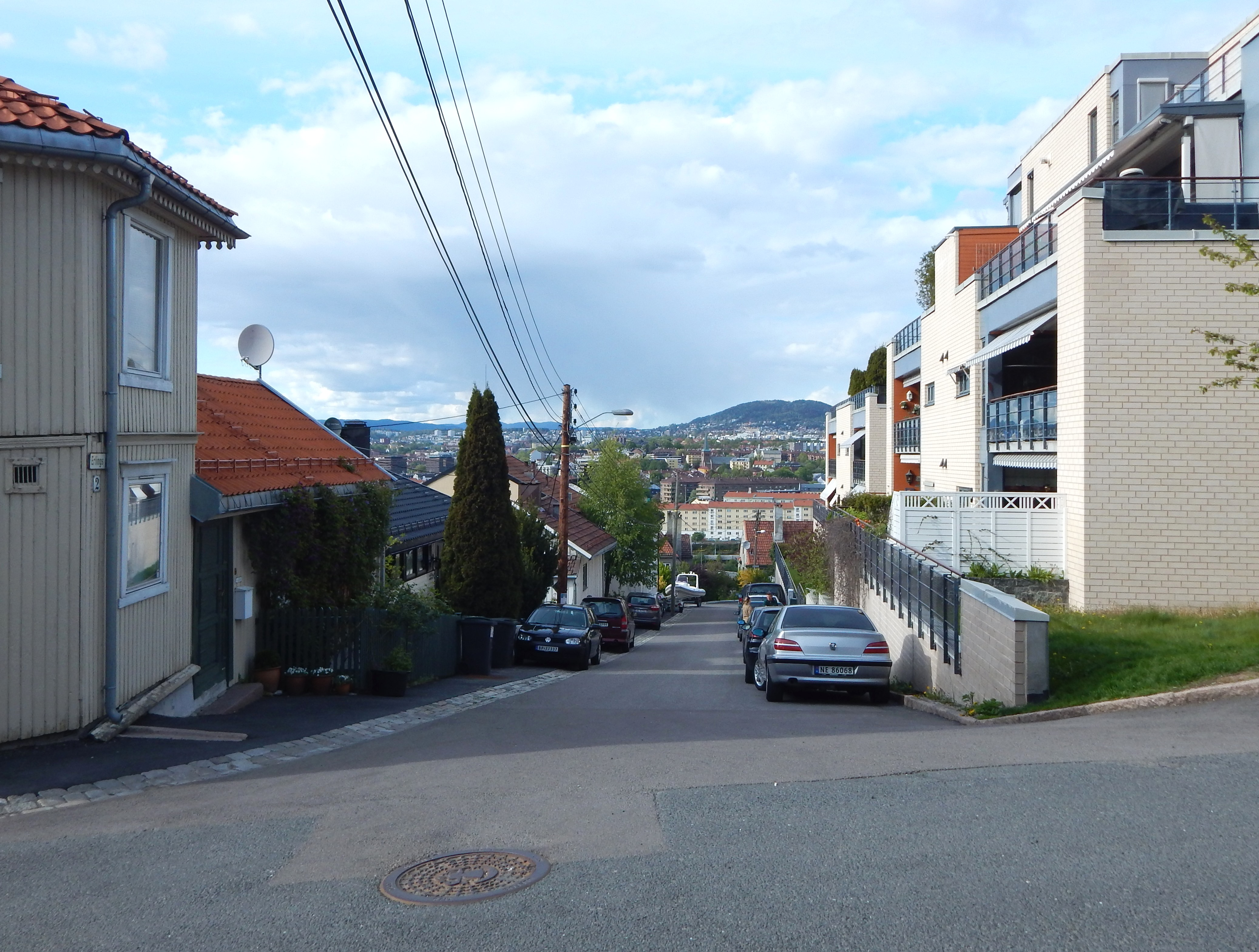 Erlings gate går ned skråningen fra Svingen.